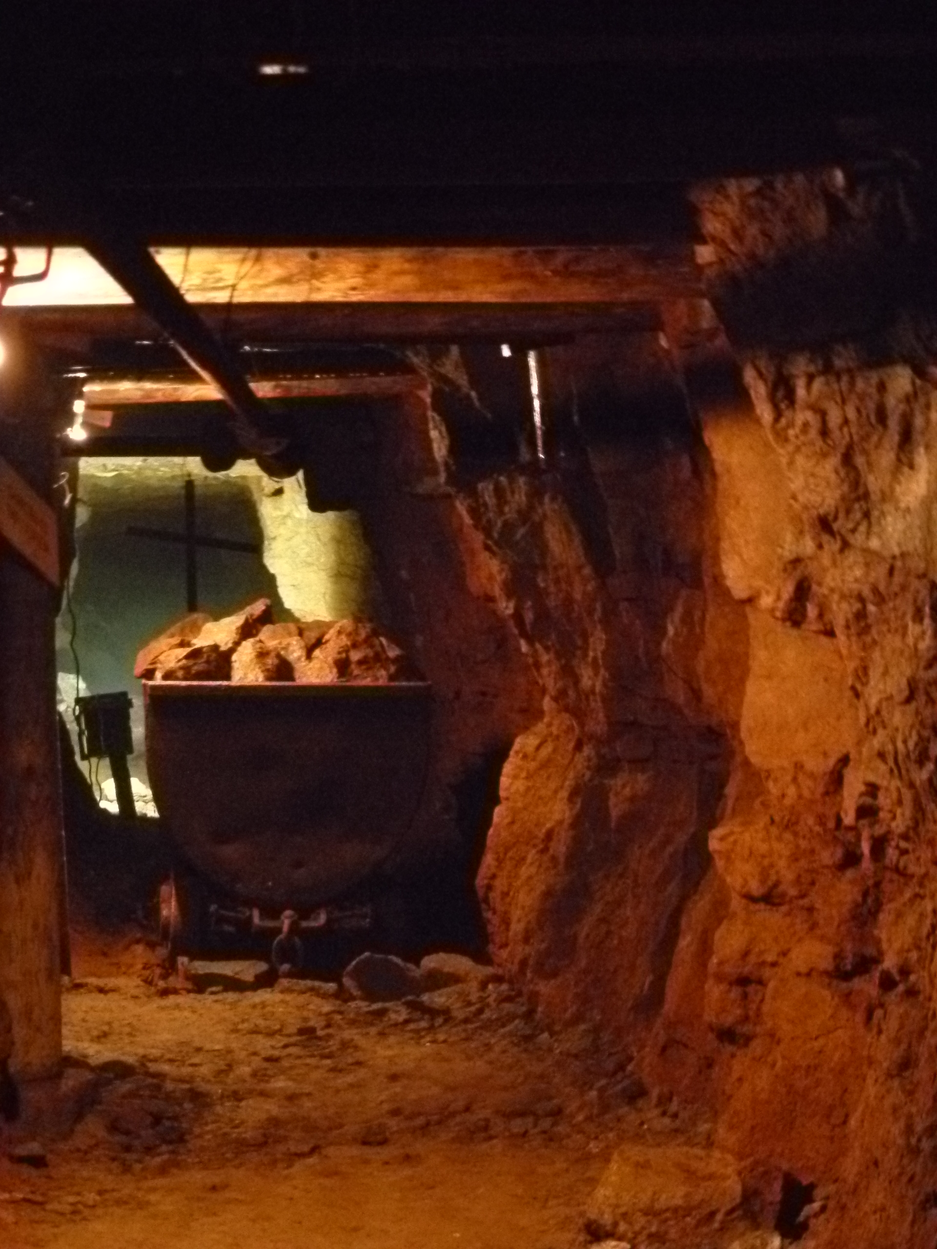 Intérieur du musée de l'AMO (Atelier de Mémoire Ouvrière), situé dans les galeries de la Mine du Val de Fer, dont l'entrée se situe sur le territoire de la commune de Neuves-Maisons.